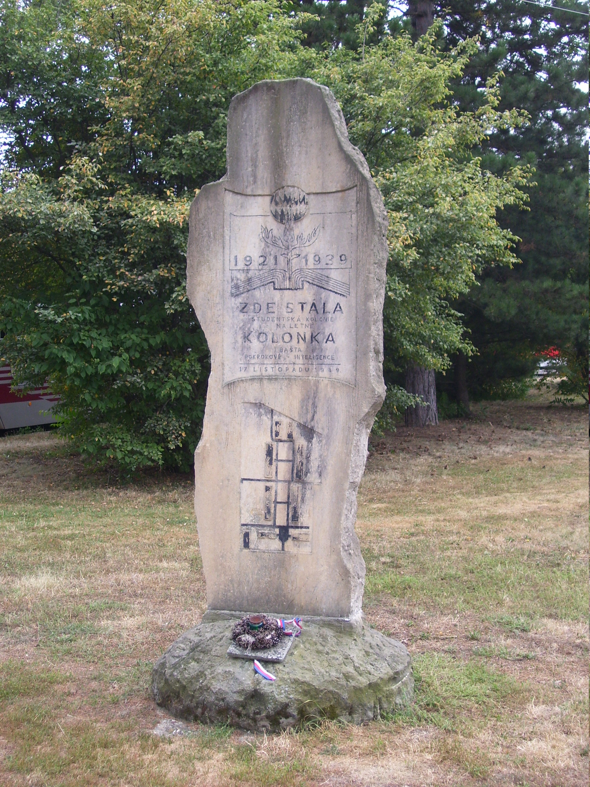 Pomník studentské ubytovny Kolonka v tramvajové smyčce Špejchar